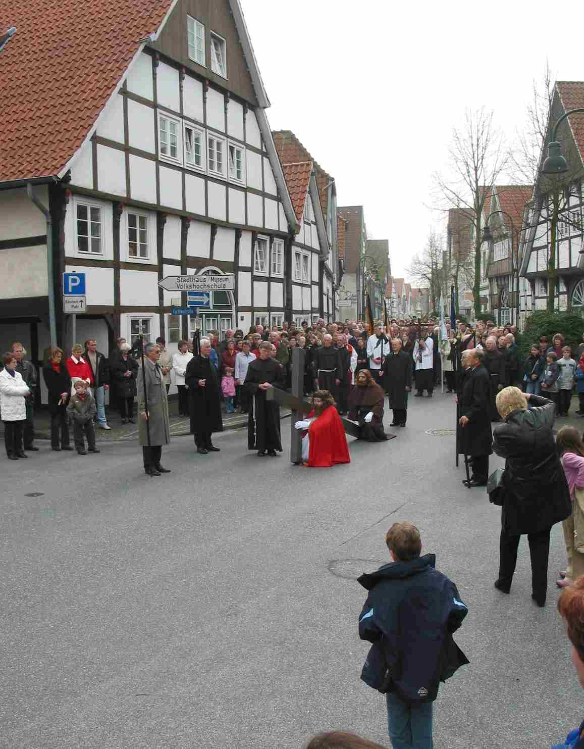 "Karfreitagsprozession Wiedenbrueck: Fall in Hoehe Krane Optik"